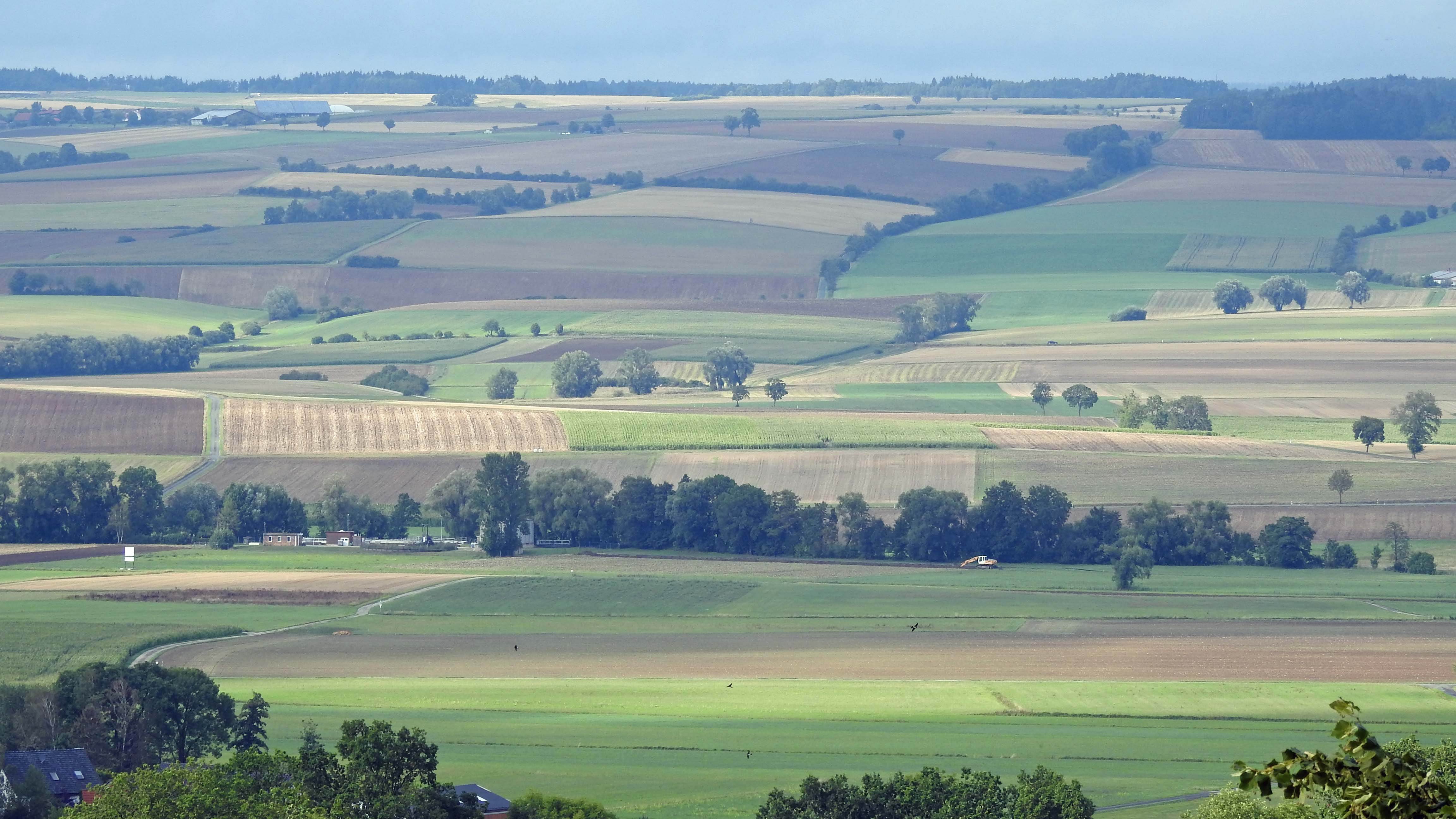 Callenberg, Lange Berge nördlich von Coburg, Landkreis Coburg